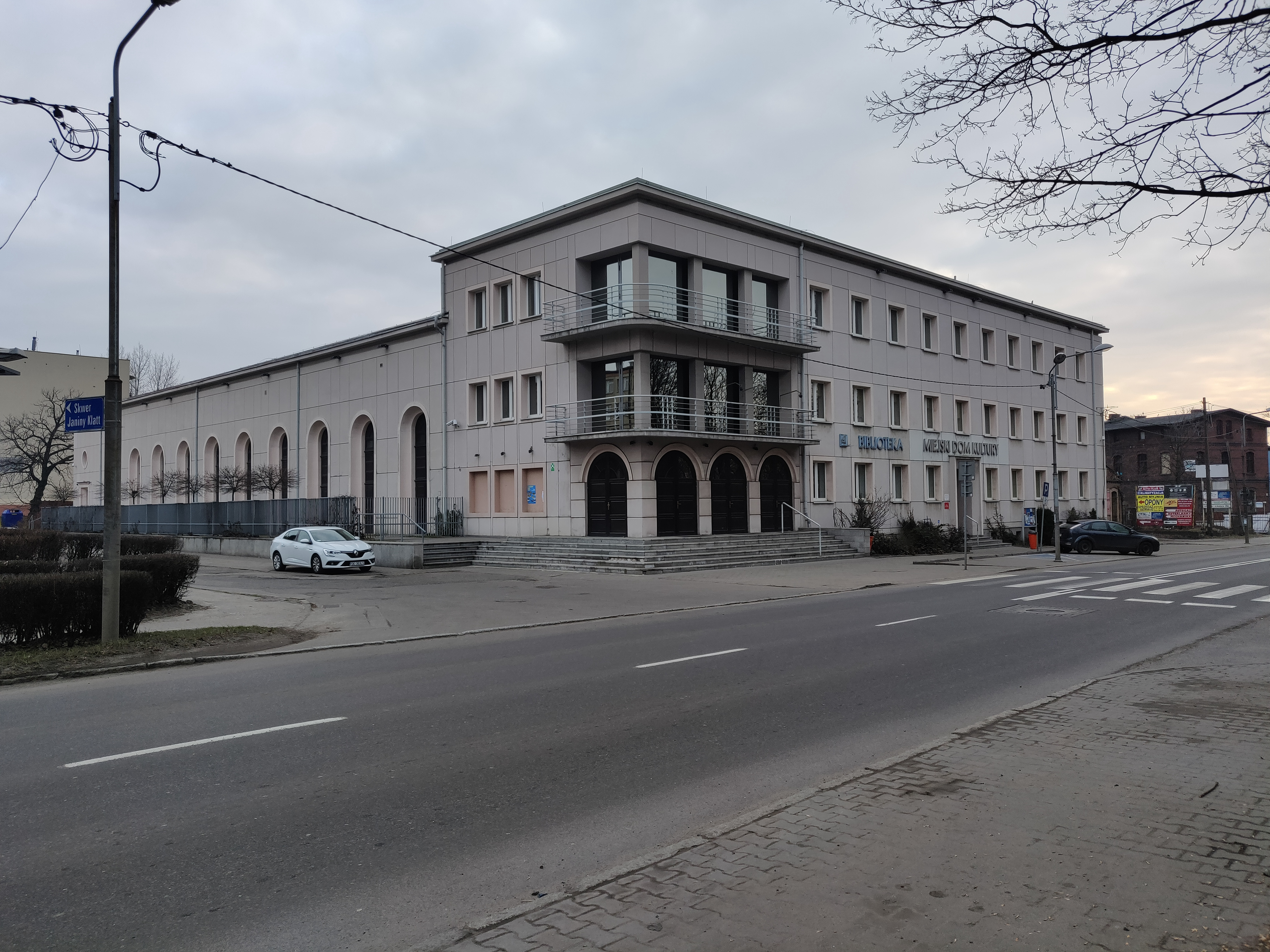 Budynek Miejskiego Domu Kultury przy ul. gen. J. Hallera 28